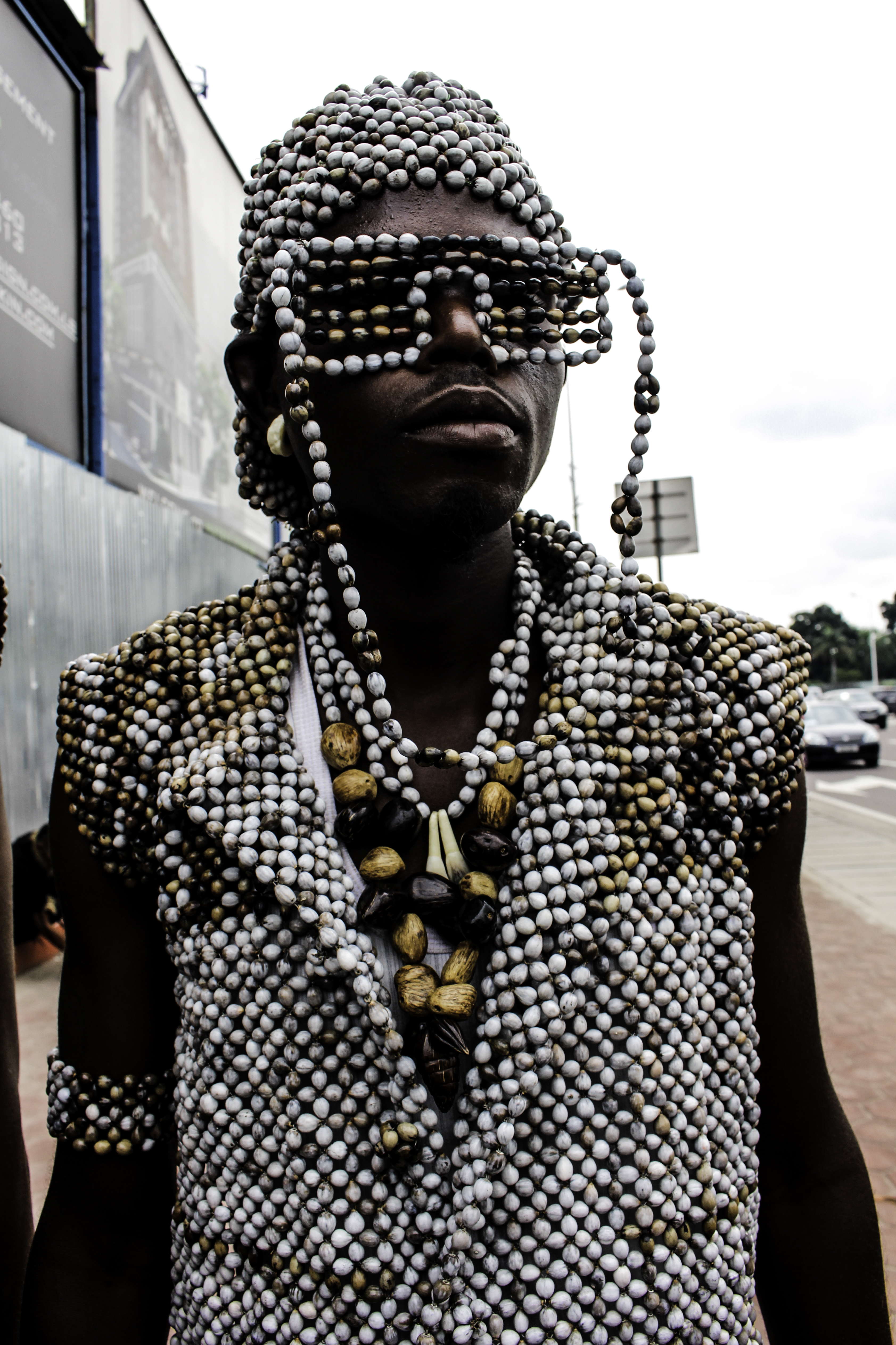 un sapeur traditionnel habillé en tenue faite à base de perles à Kinshasa This is an image of Cultural Fashion or Adornment from Democratic Republic of the Congo